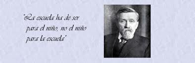 una frase muy recoocida de olvide decroly